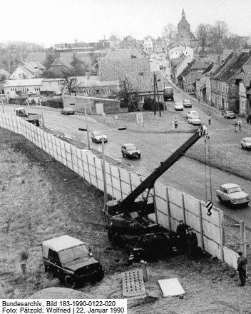 Ein Autodrehkran 80 der NVA ist an der innerdeutschen Grenze bei Dassow mit dem Abbau einer Sichtschutzwand beschäftigt. Er ist im Gegegensatz zum normalbereiften Zivilmodell, wenngleich im Foto kaum erkennbar, mit Niederdruck-Ballonreifen ausgestattet.